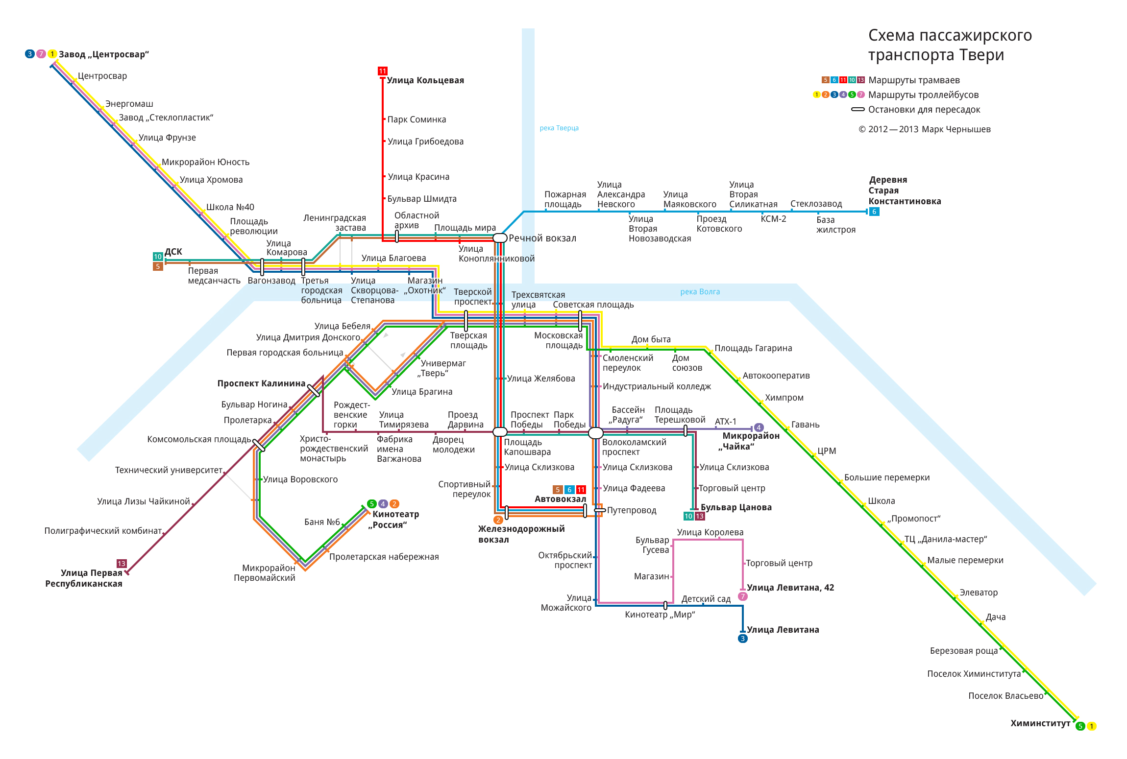 схема, тверь, трамвай, троллейбус, транспорт